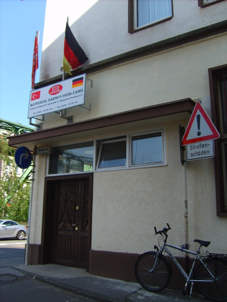 Fatih-Moschee, Wuppertal, Germany